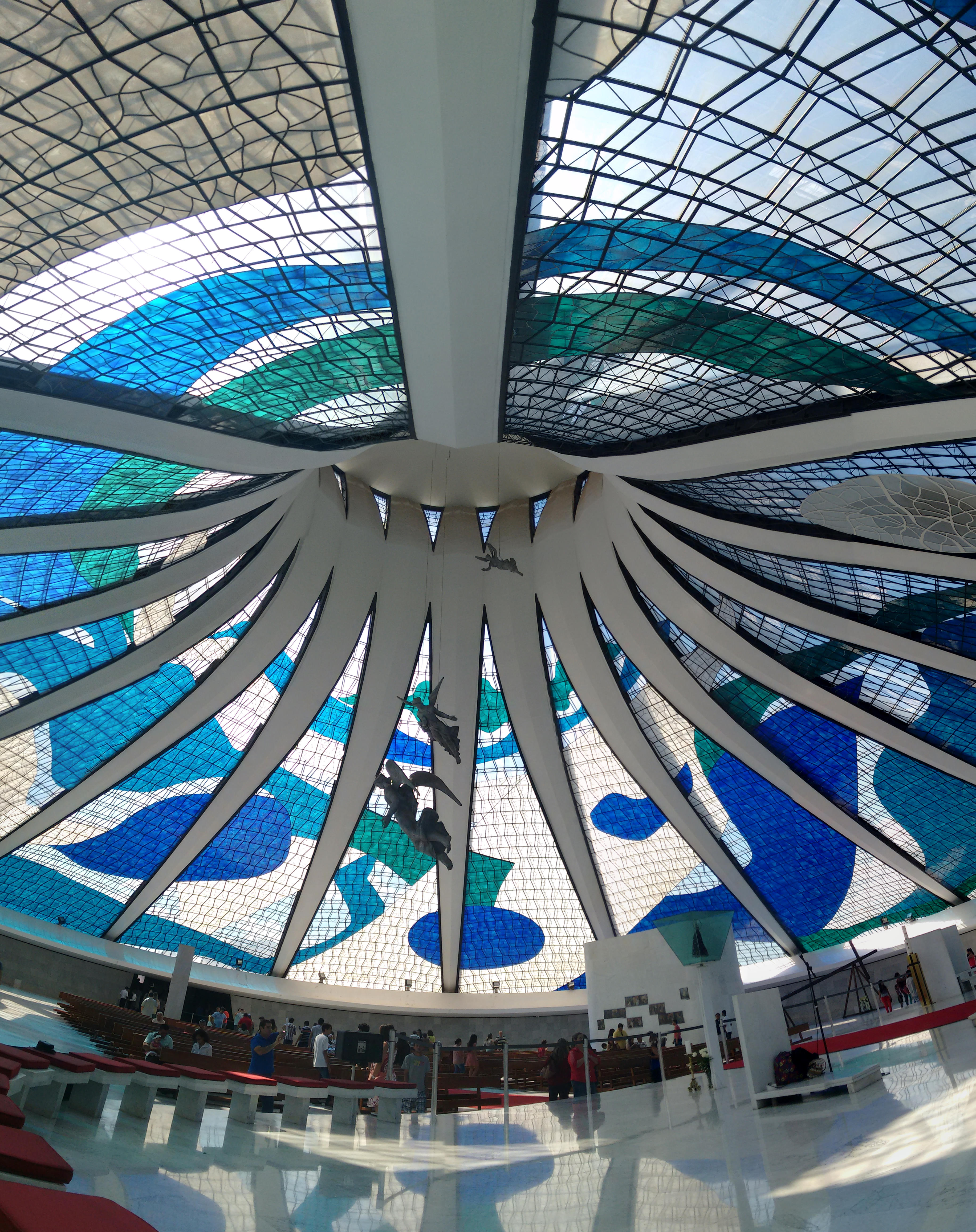 Mosaico fotográfico do interior da Catedral Metropolitana de Brasília.